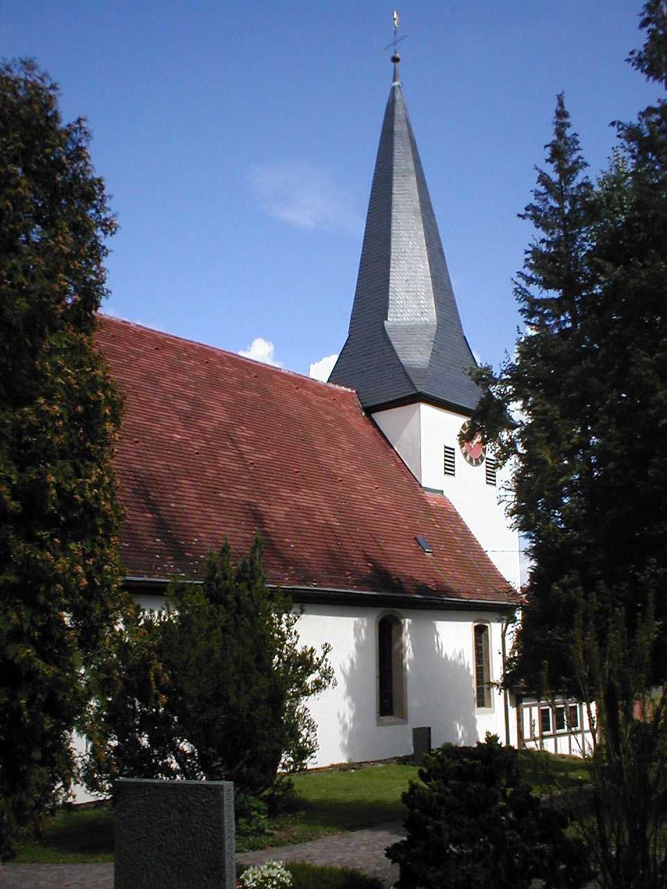 Evangelische Kilianskirche in Talheim